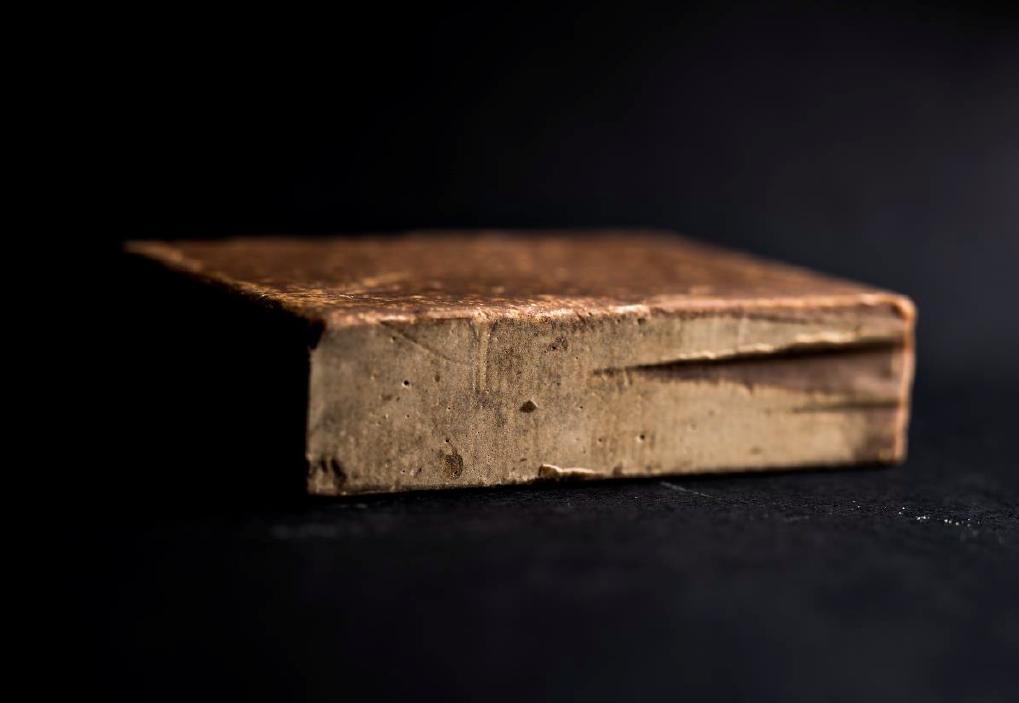 Photo d'un pain de Galabé